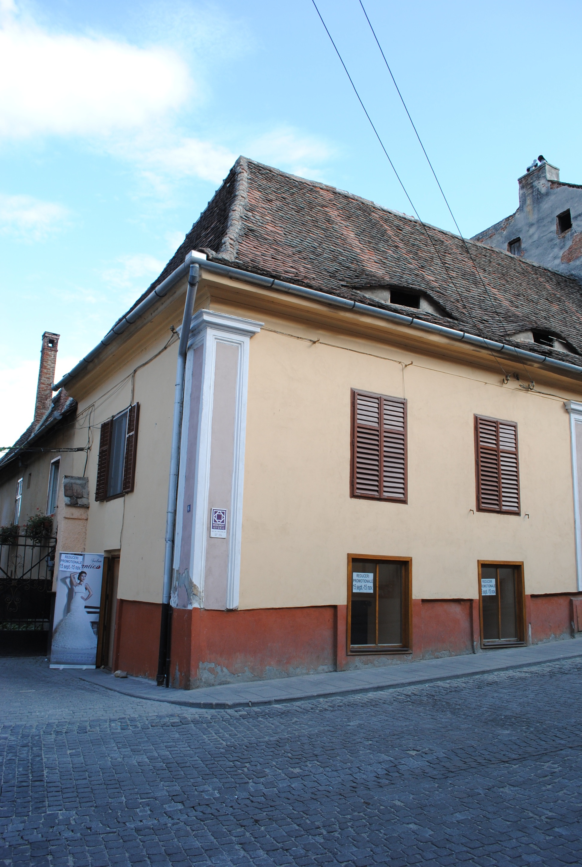 Casă, a doua jum. sec. XV - prima jum. sec. XVI, sec. XVIII; 1925 - 1950